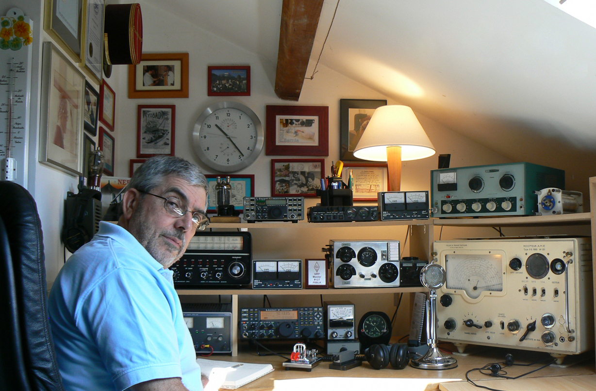 Shack de F6BLK en septembre 2008